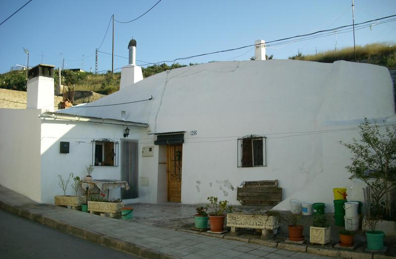 Cueva vivienda en Crevillent (Alacant)